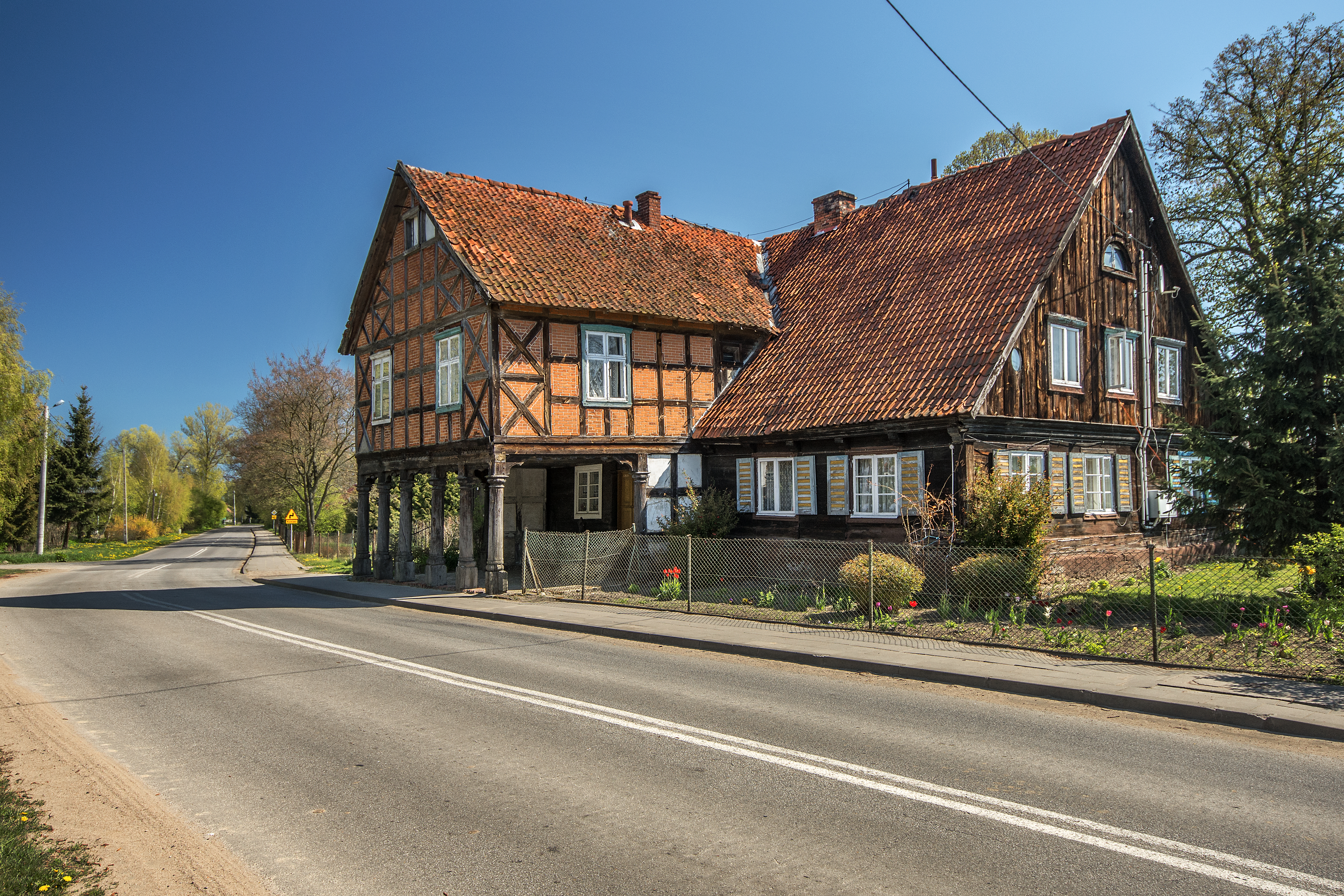 Żuławki - dom podcieniowy nr 32/33, 1797, 1851